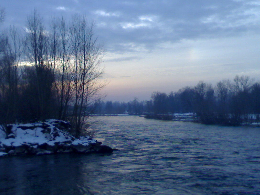 Nei Boschi del parco Adda sud, foto scattata da me.